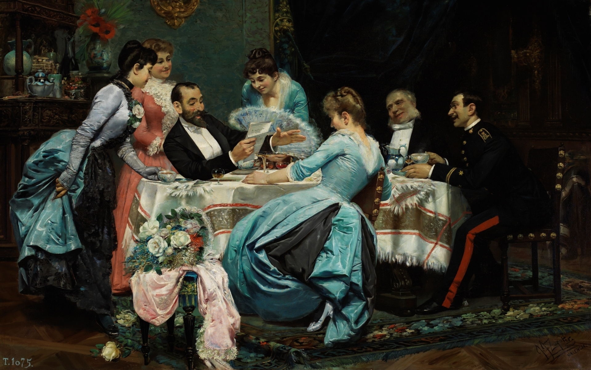 La obra representa a varios individuos sentados alrededor de una mesa y escuchando la lectura de una poesía.